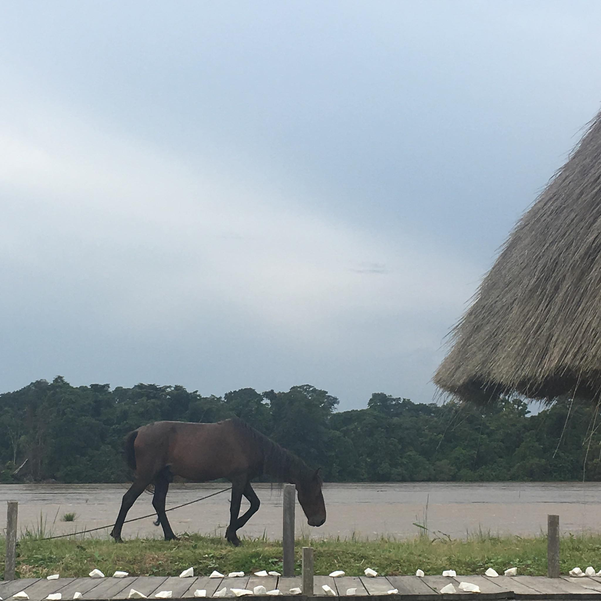 Chevaux attaché Nkolmetet, Sud Cameroun